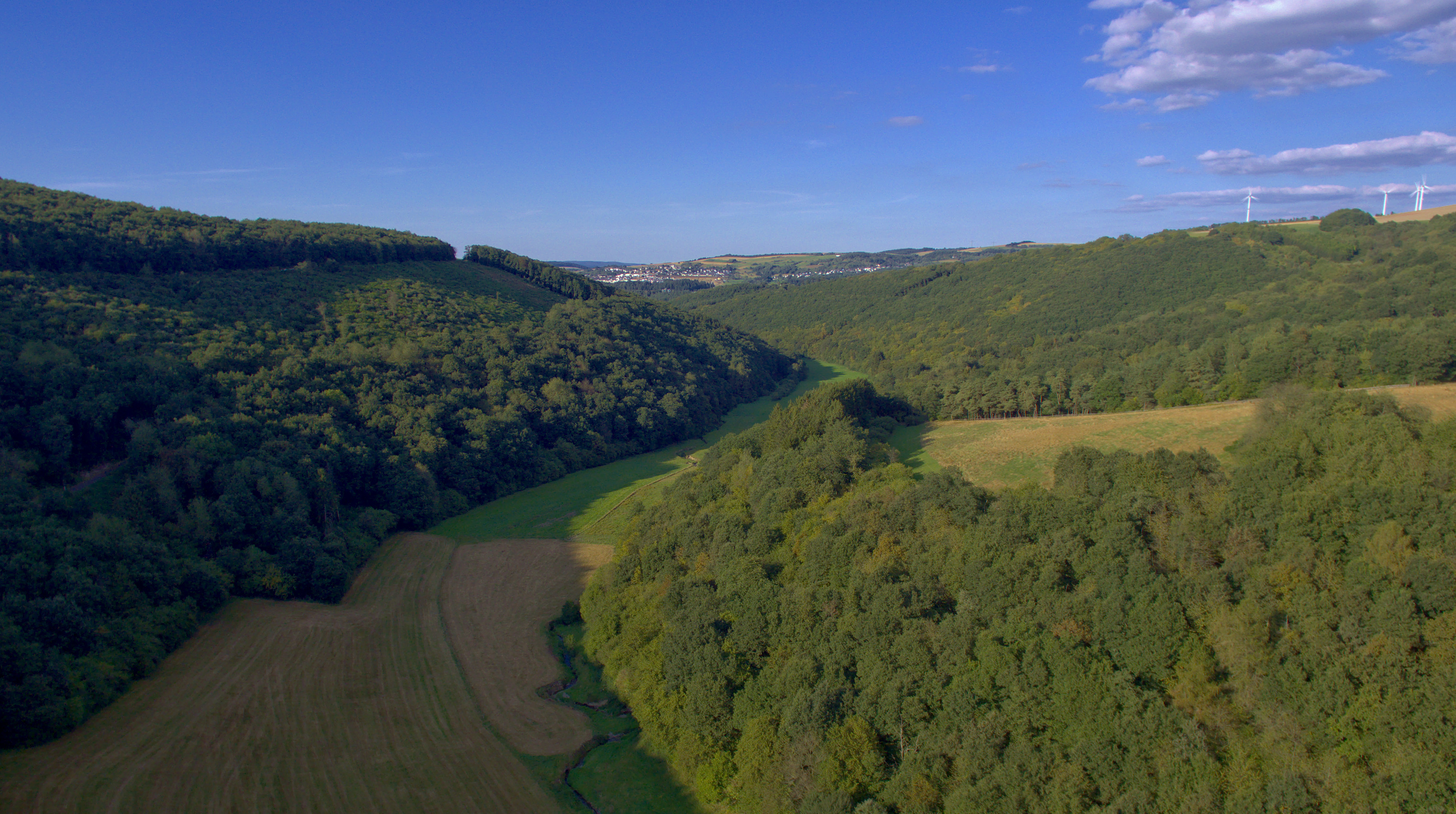 Tal des Olewiger Bachs (in openstreetmap Grundbach) zwischen Trier-Olewig und Franzenheim. Blick nach Norden - im Hintergrund die Häuser von Trier-Tarforst.